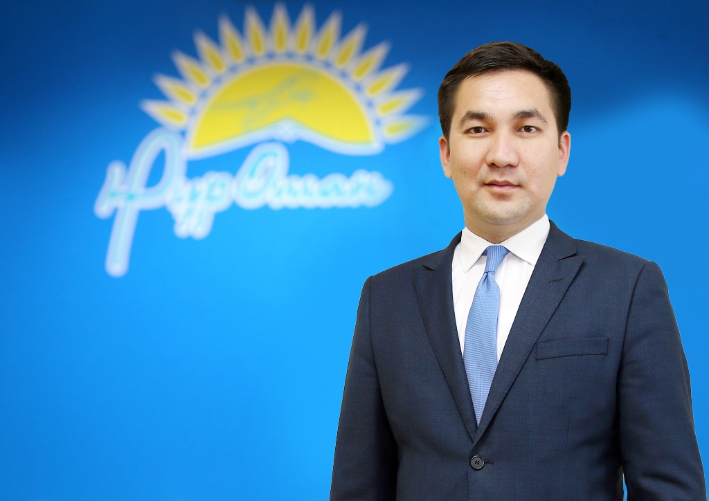 Председатель МК "Жас Отан"